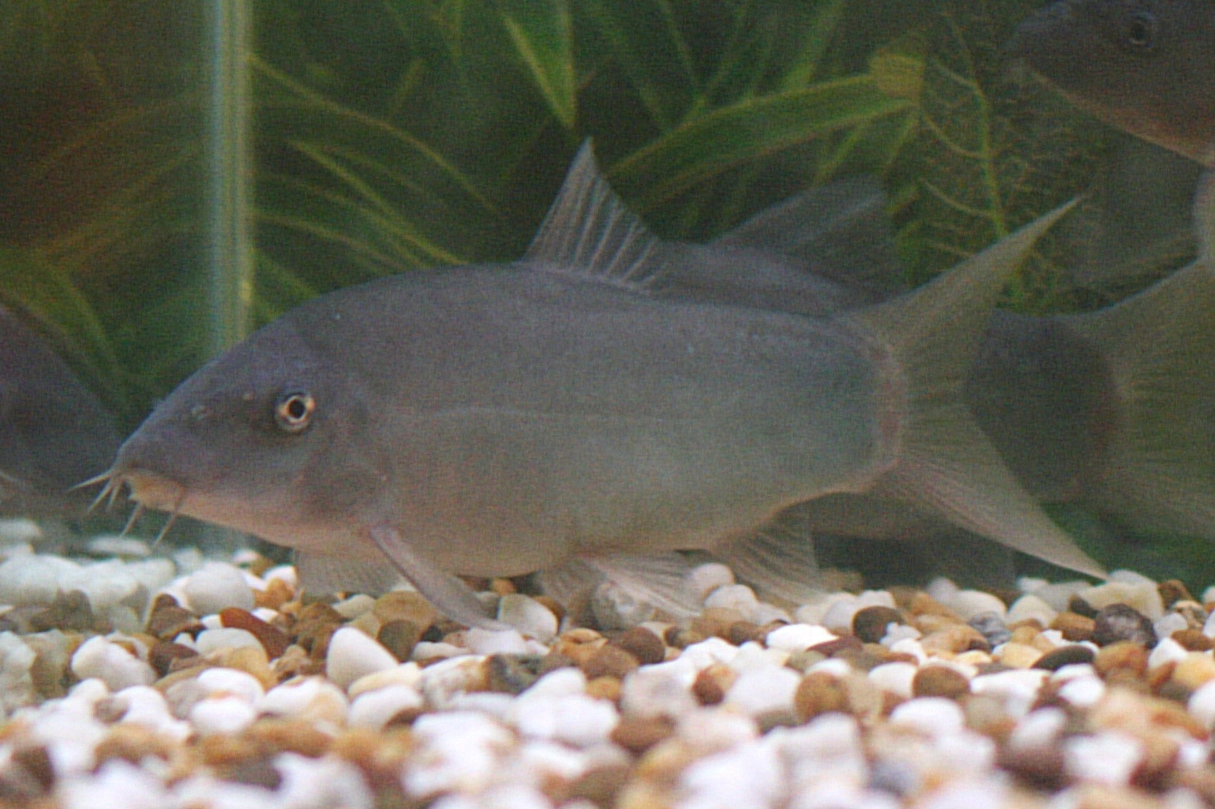 Yasuhikotakia modesta. Size about 12cm TL.